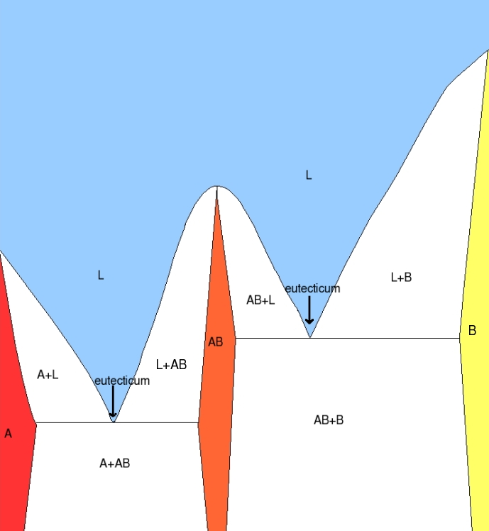 een binair systeem met een verbinding en twee eutectica eigen werk